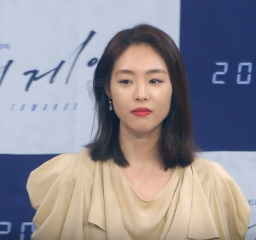 1월 22일 오후 서울시 마포구 상암동 MBC 에서 새 수목드라마 '더 게임: 0시를 향하여' 제작발표회가 열려 배우 옥택연, 이연희, 임주환, 장준호 PD가 참석해 작품에 대한 소개와 배역을 설명하고 있다.